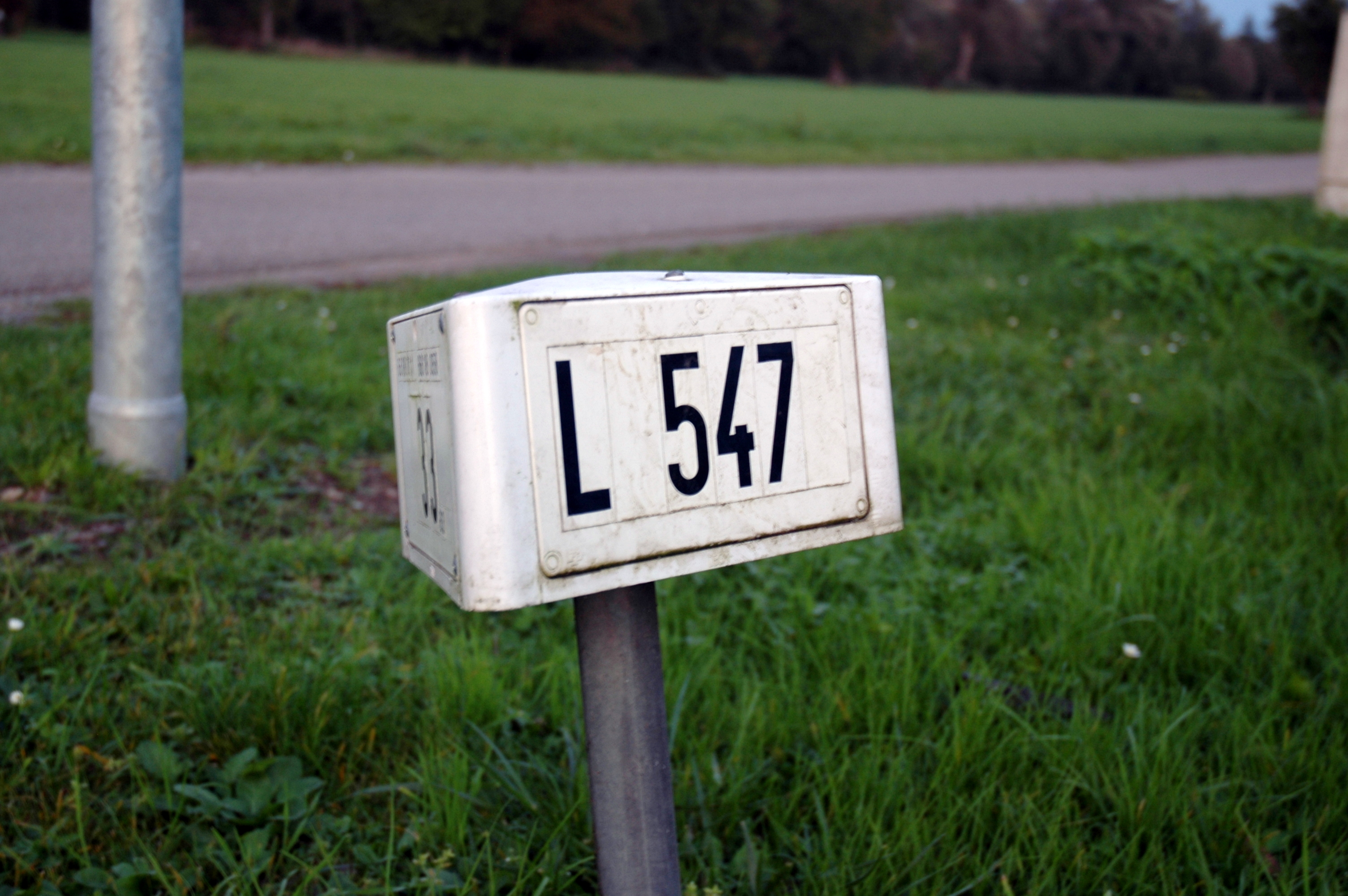 Mauer: Landstrasse 547